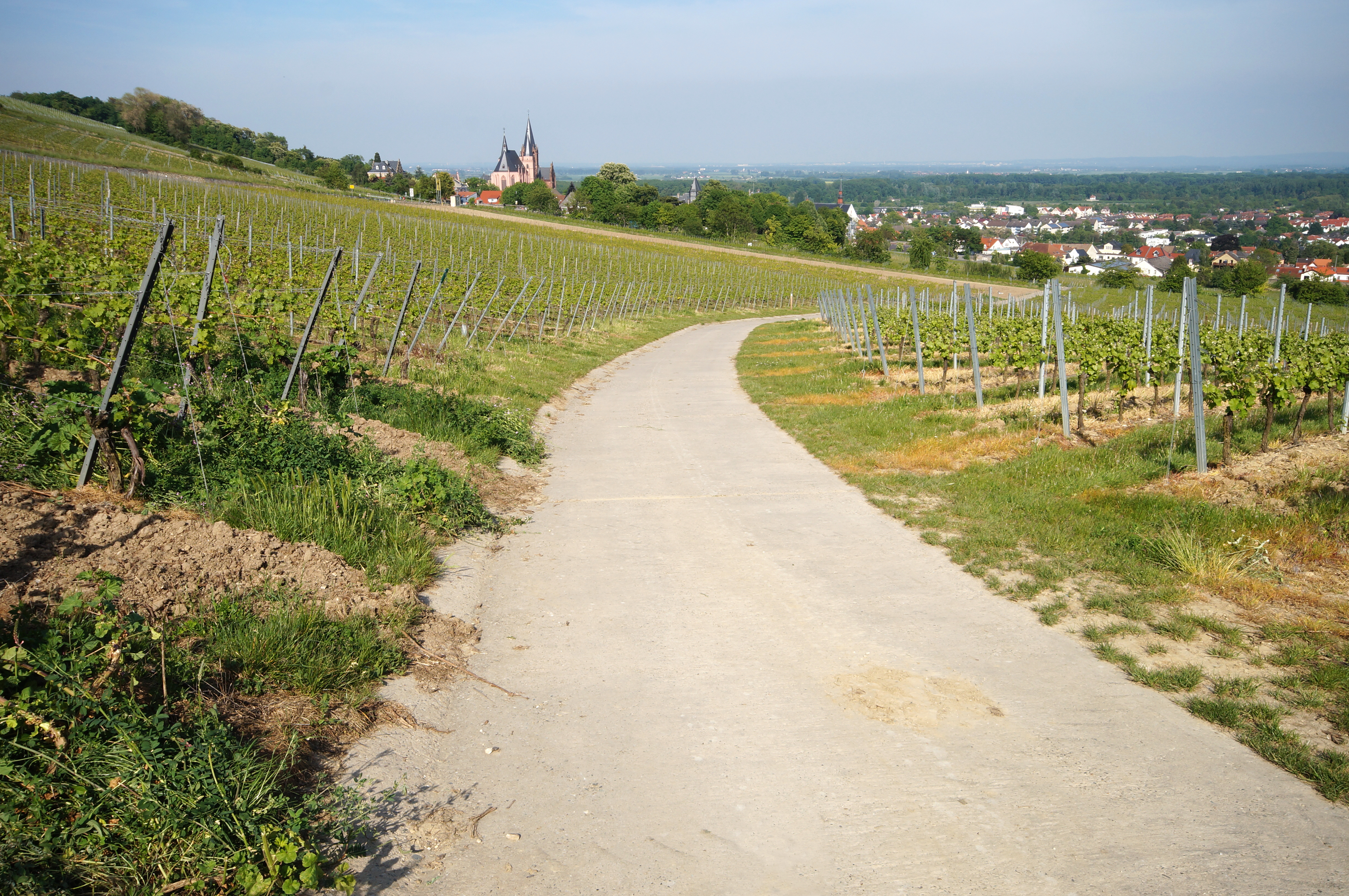 Der Rheinterrassenweg auf der Oppenheimer Gemarkung. Im Hintergrund ist auf der linken Seite die Oppenheimer Katharinenkirche zu sehen.